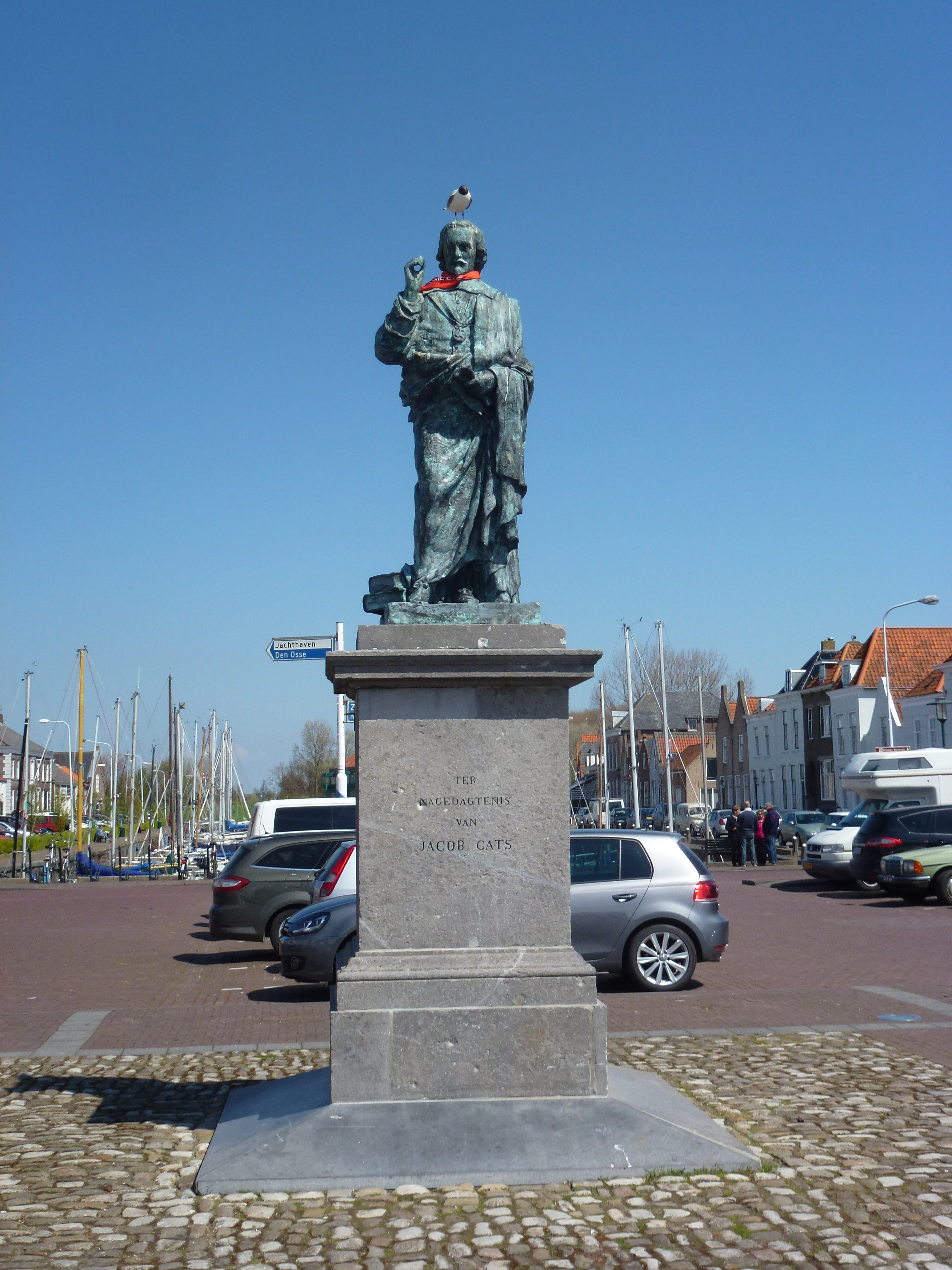 Standbeeld Jacob Cats, Brouwershaven